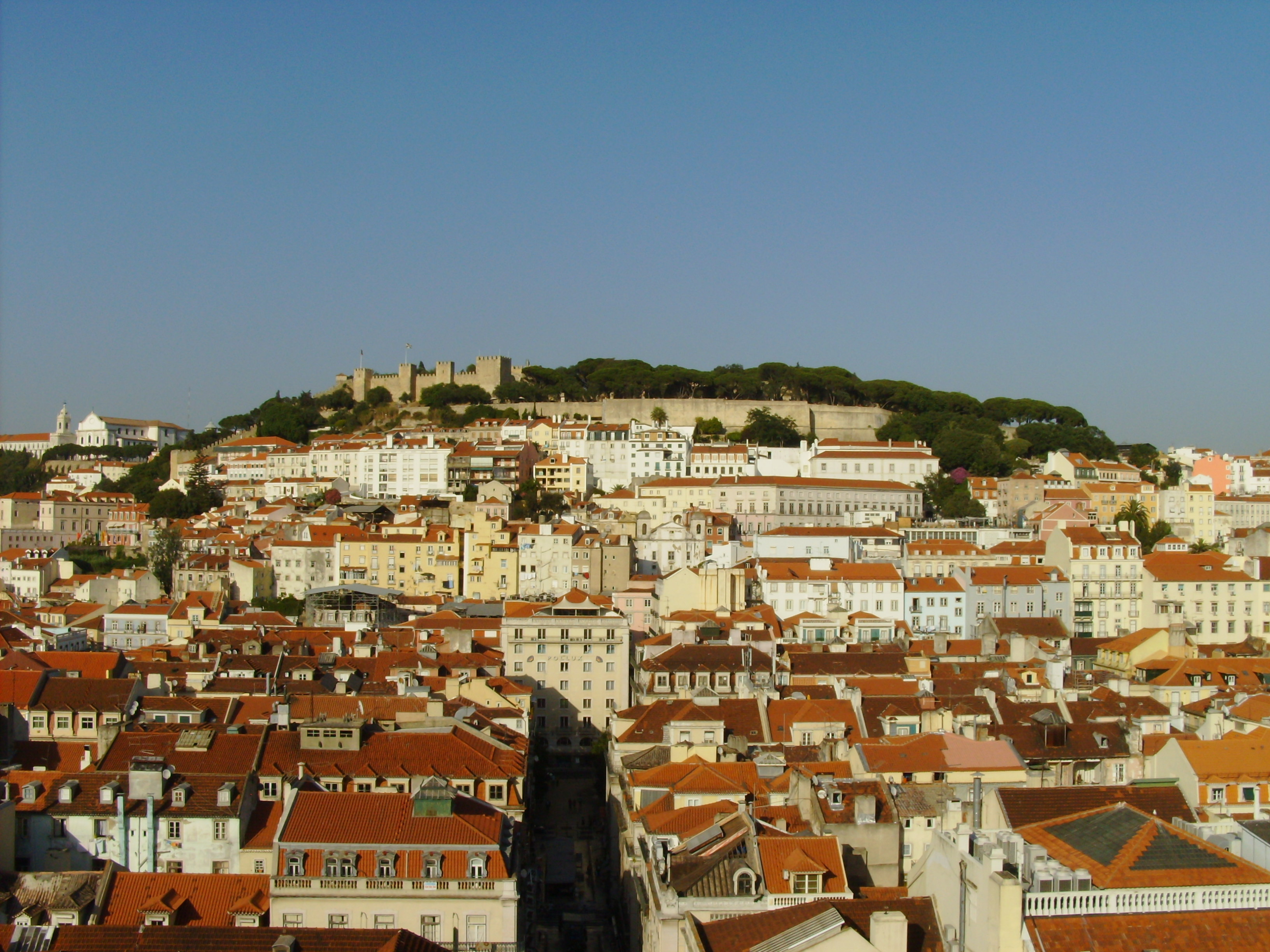 Castelo de São Jorge, Lisboa, Portugal: vista a partir do mirante do Elevador de Santa Justa.